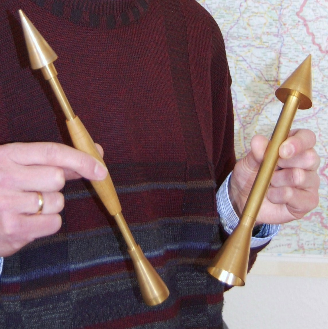 Zwei unterschiedliche Stimmhörner zur Feinstimmung von Orgelpfeifen